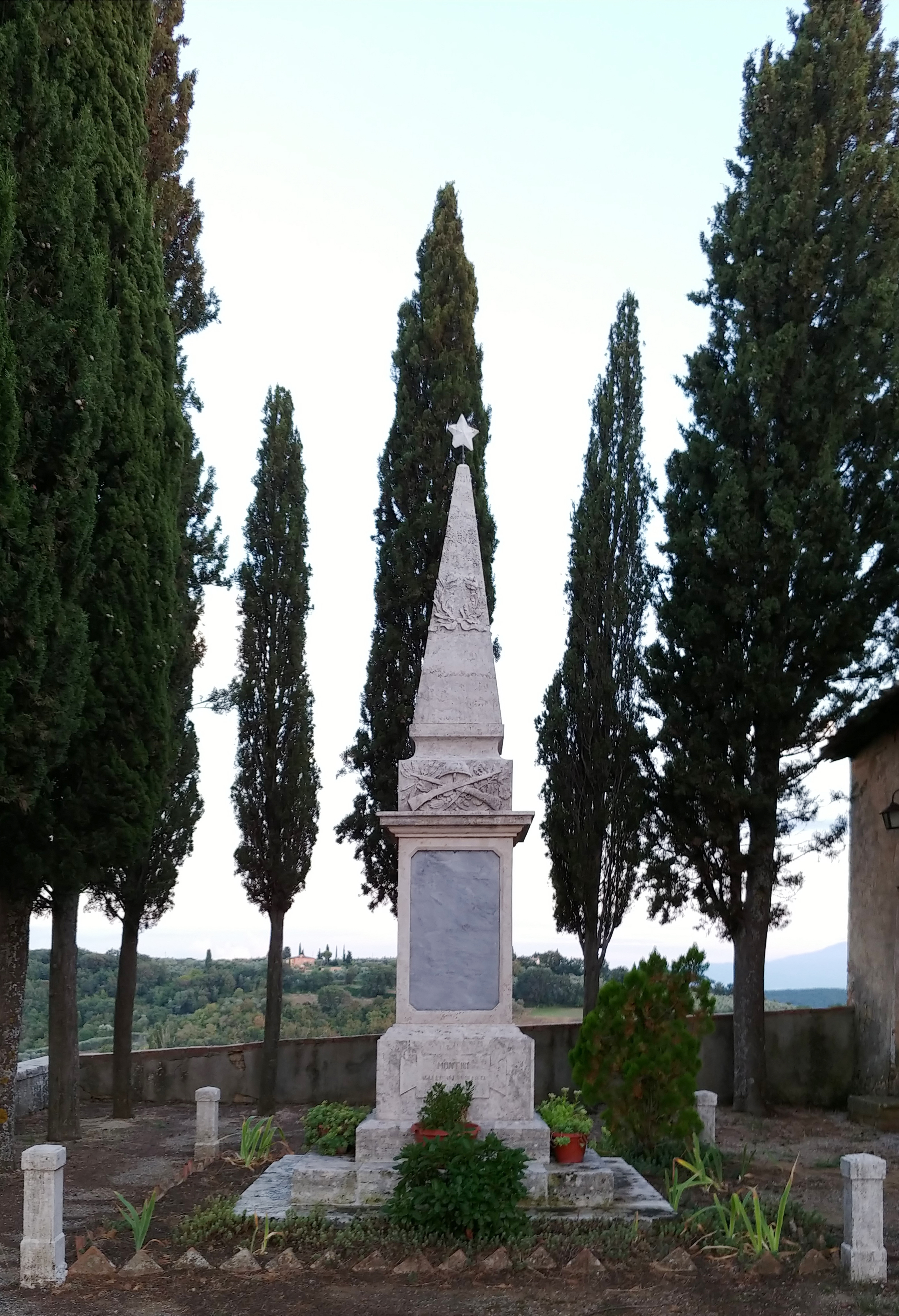 Il Monumento ai Caduti di Montisi, in provincia di Siena, costruito di fianco al Santuario della Madonna delle Nevi.